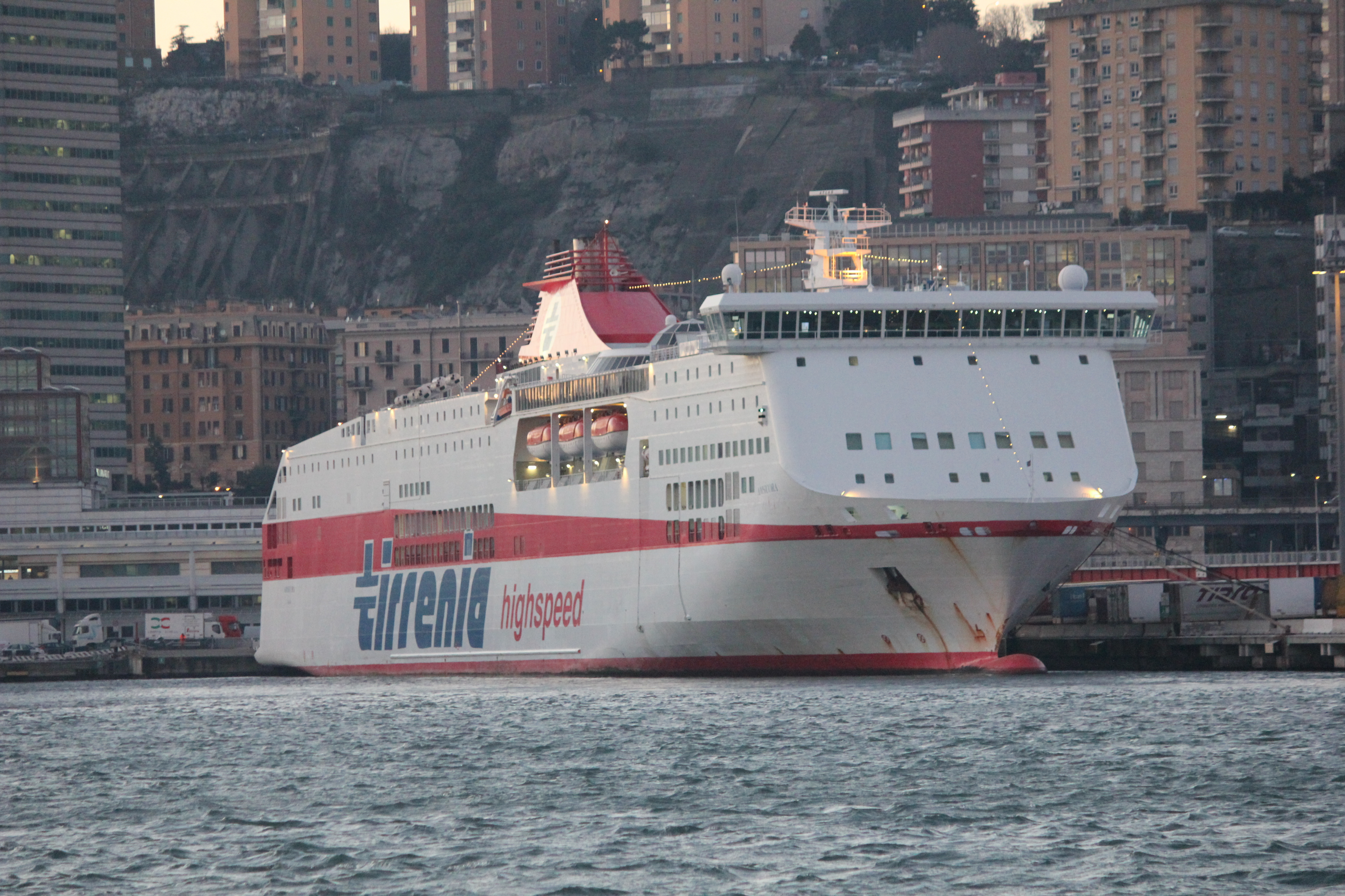 La "Amsicora" ormeggiata a Genova